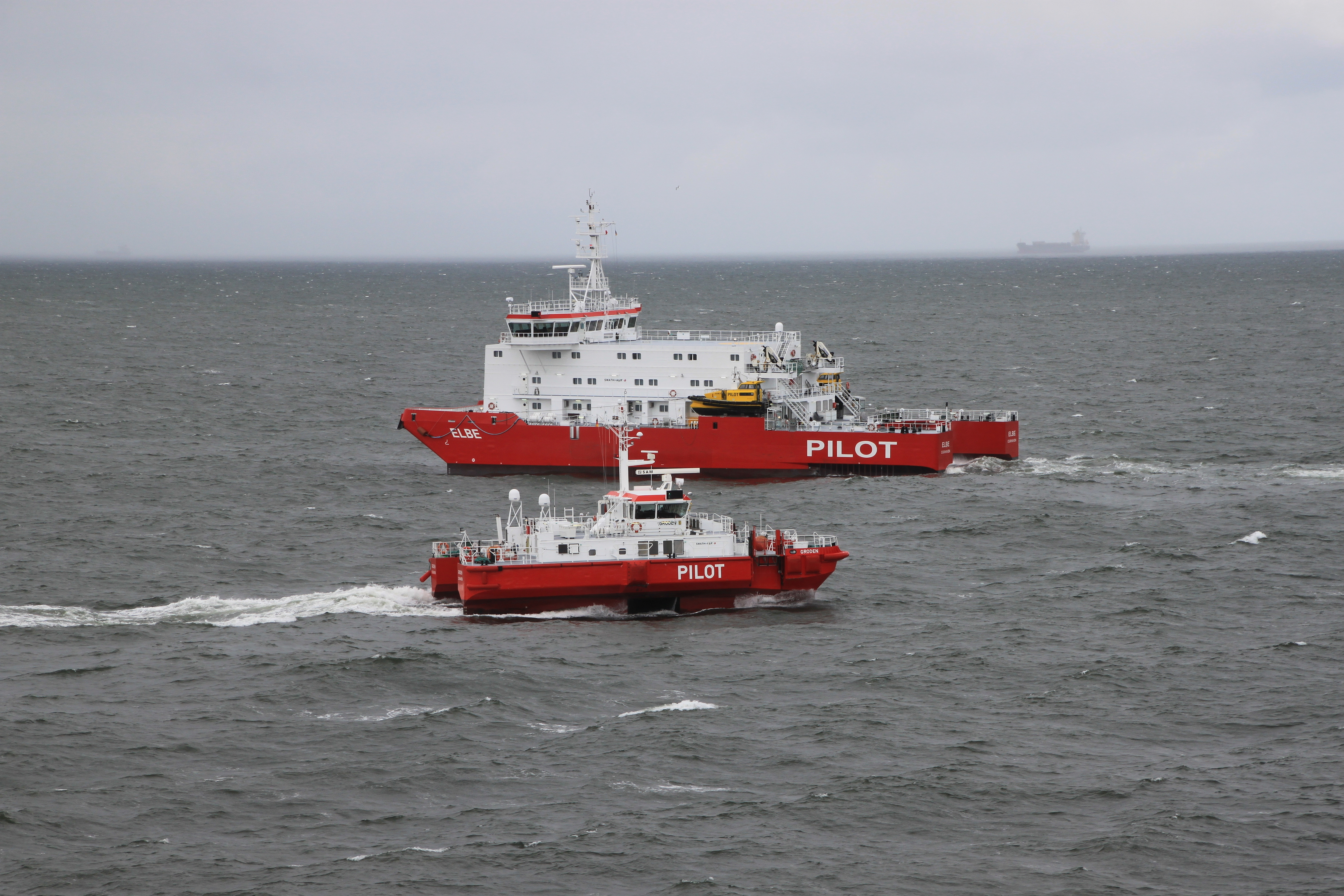 Lotsentender GRODEN und Lotsen-Mutterschiff ELBE bei Elbe 1